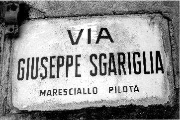 Stada intitolata Giuseppe Sgariglia Qualiano